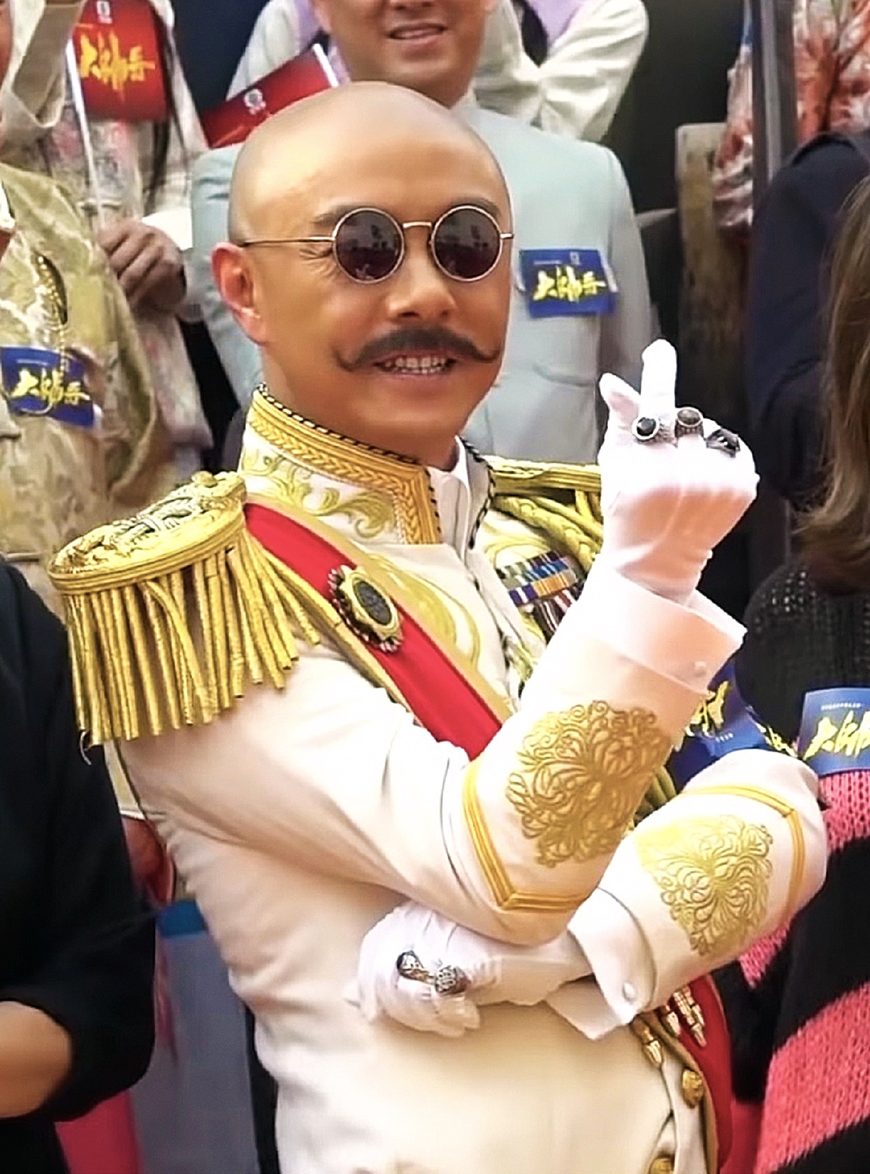 中文（香港）: 1984年經無綫電視及華星唱片合辦的《第3屆新秀歌唱大賽》而晉身娛樂圈，隨後拍攝多套劇集與電影，代表作包括《老友鬼鬼》、《超級學校霸王》、《西遊記》、《大帥哥》等。